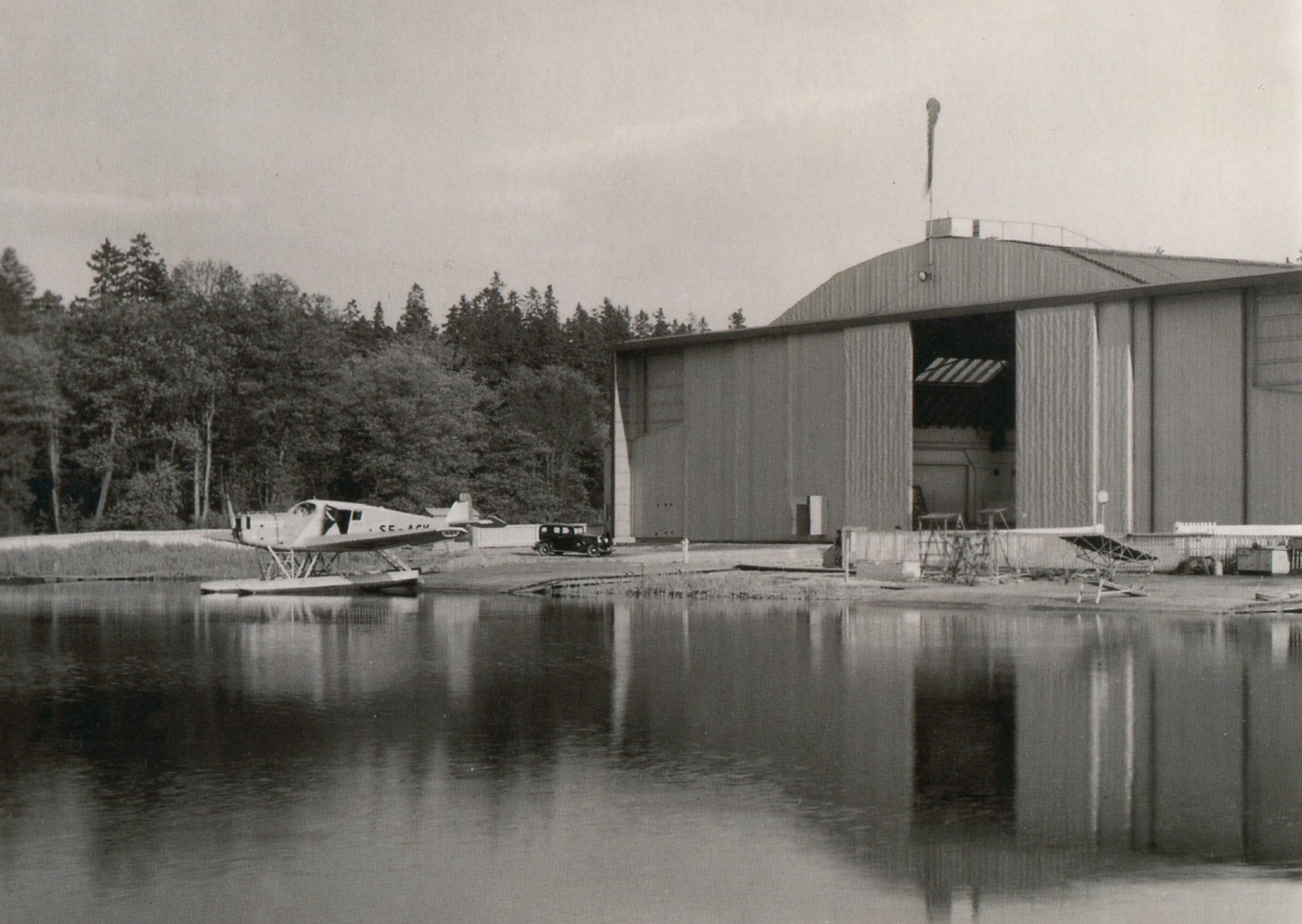 Lindarängens flyghamn i Stockholm med ett Junkers F13-plan med plats för fyra passagerare